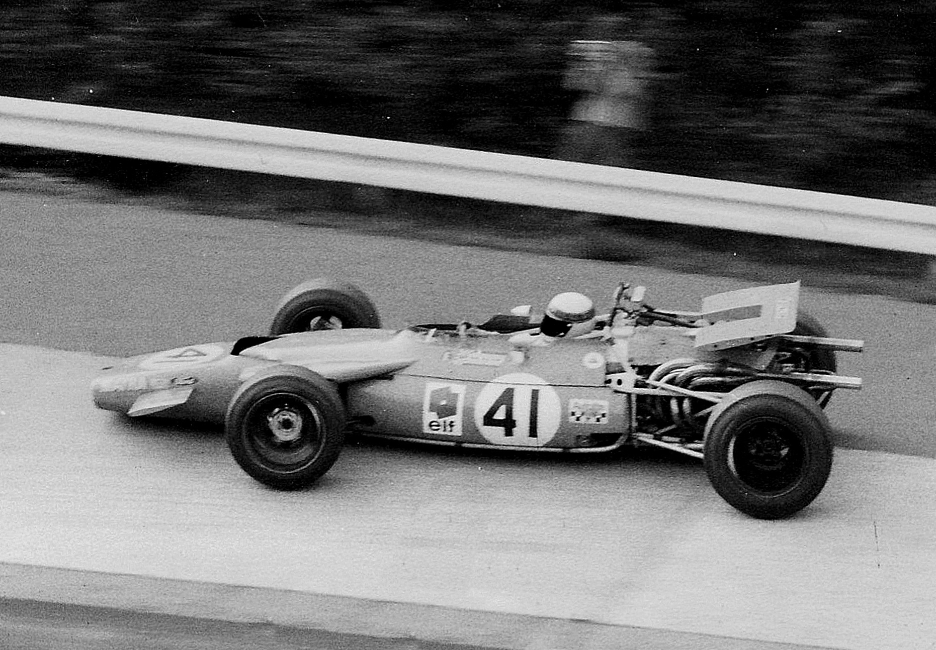 Jackie Stewart im Matra MS 84 eingangs Karussell